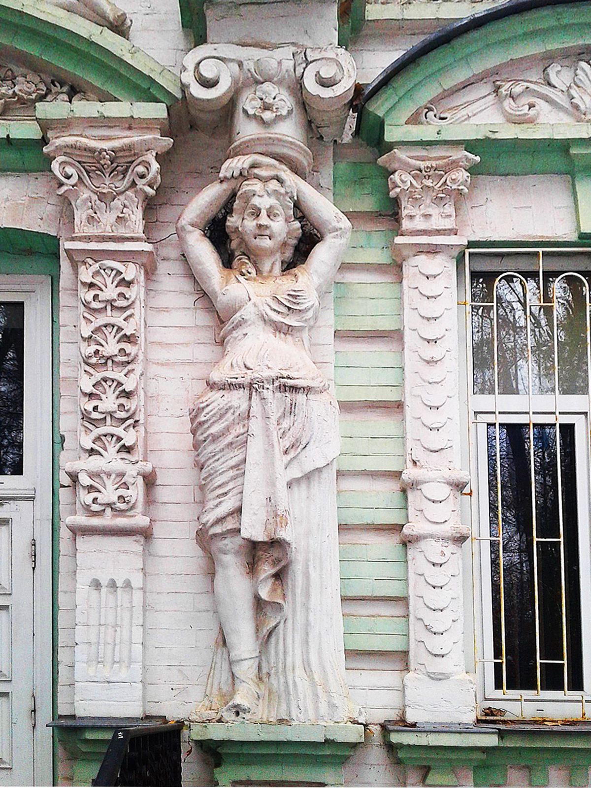 Каріатида на дача у формах «київського ренесансу», 1905—1908 (вул. Львівська, 18)